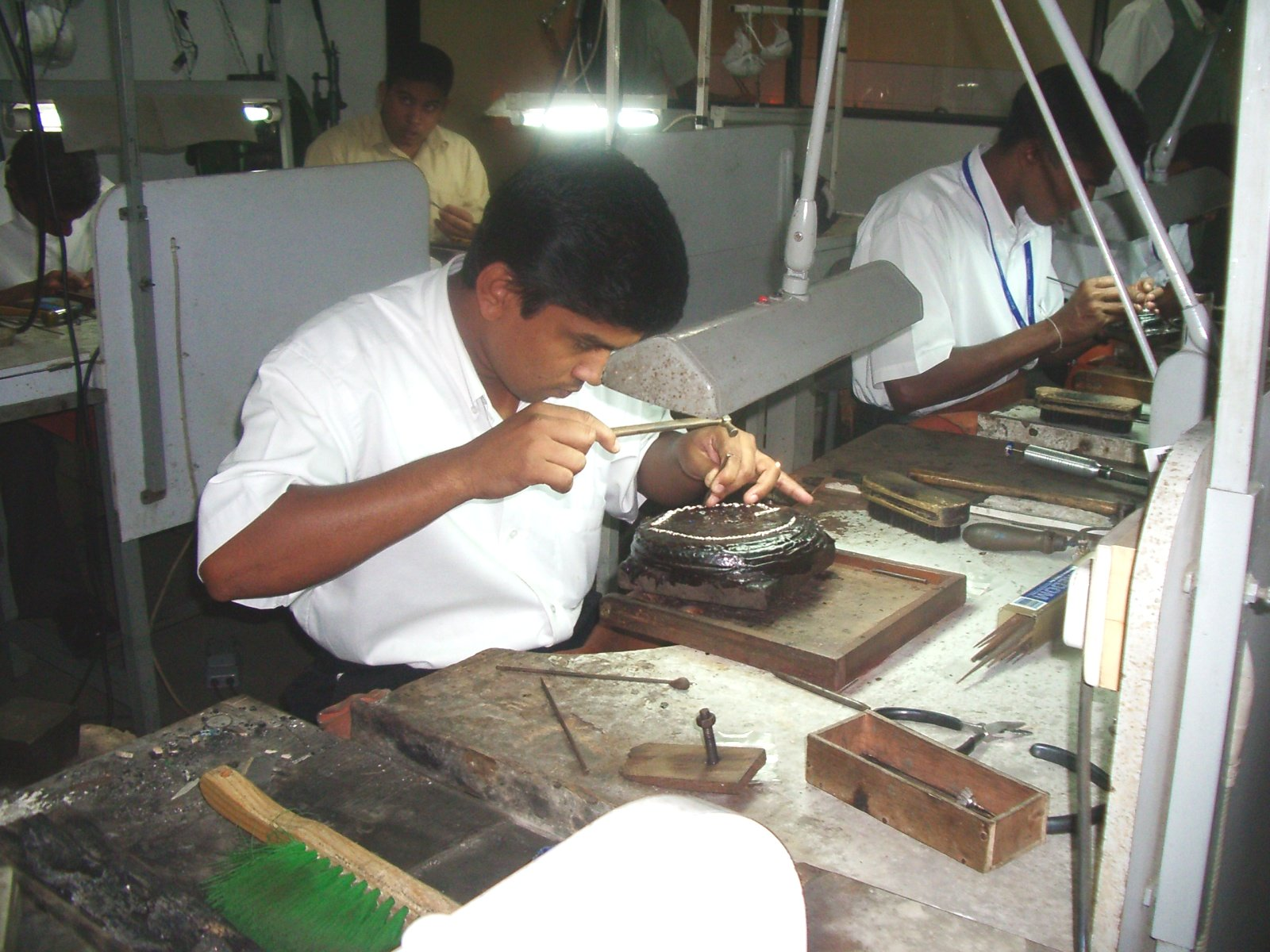 treball amb zafirs a una joieria especialitzada a Sri Lanka; foto feta per J. Ollé el juliol del 2006.